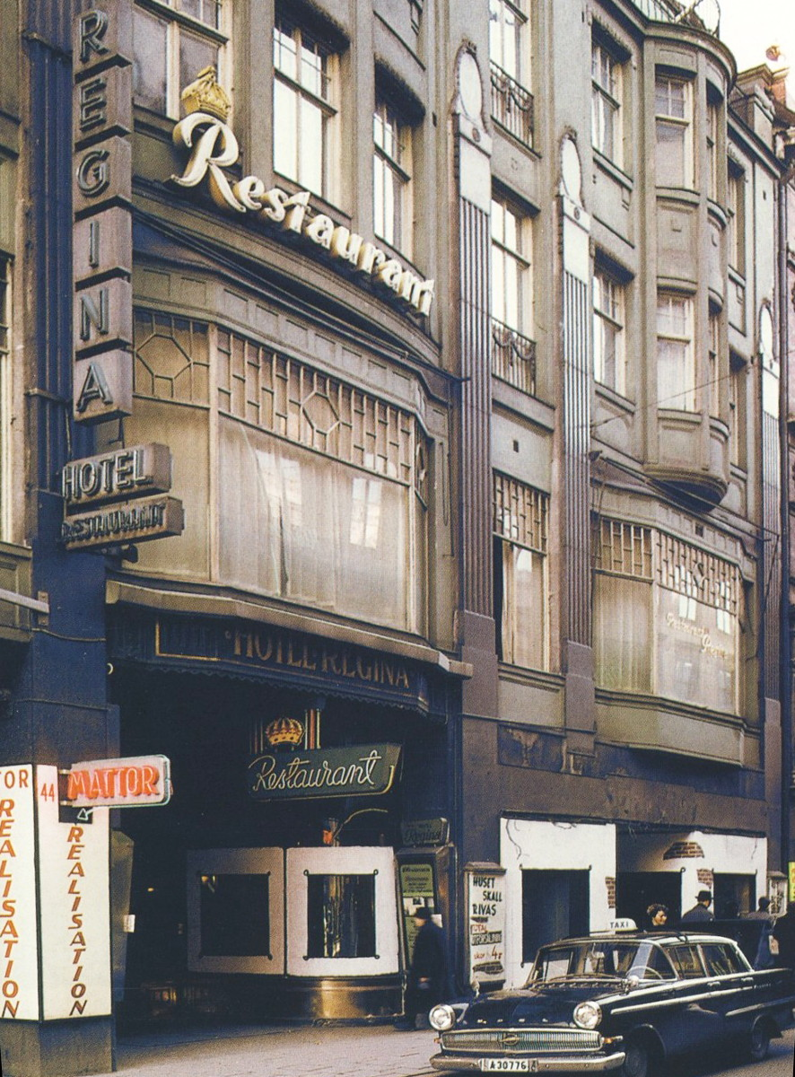 "Hotel Regina", Drottninggatan 42 i Stockholm (numera riven)